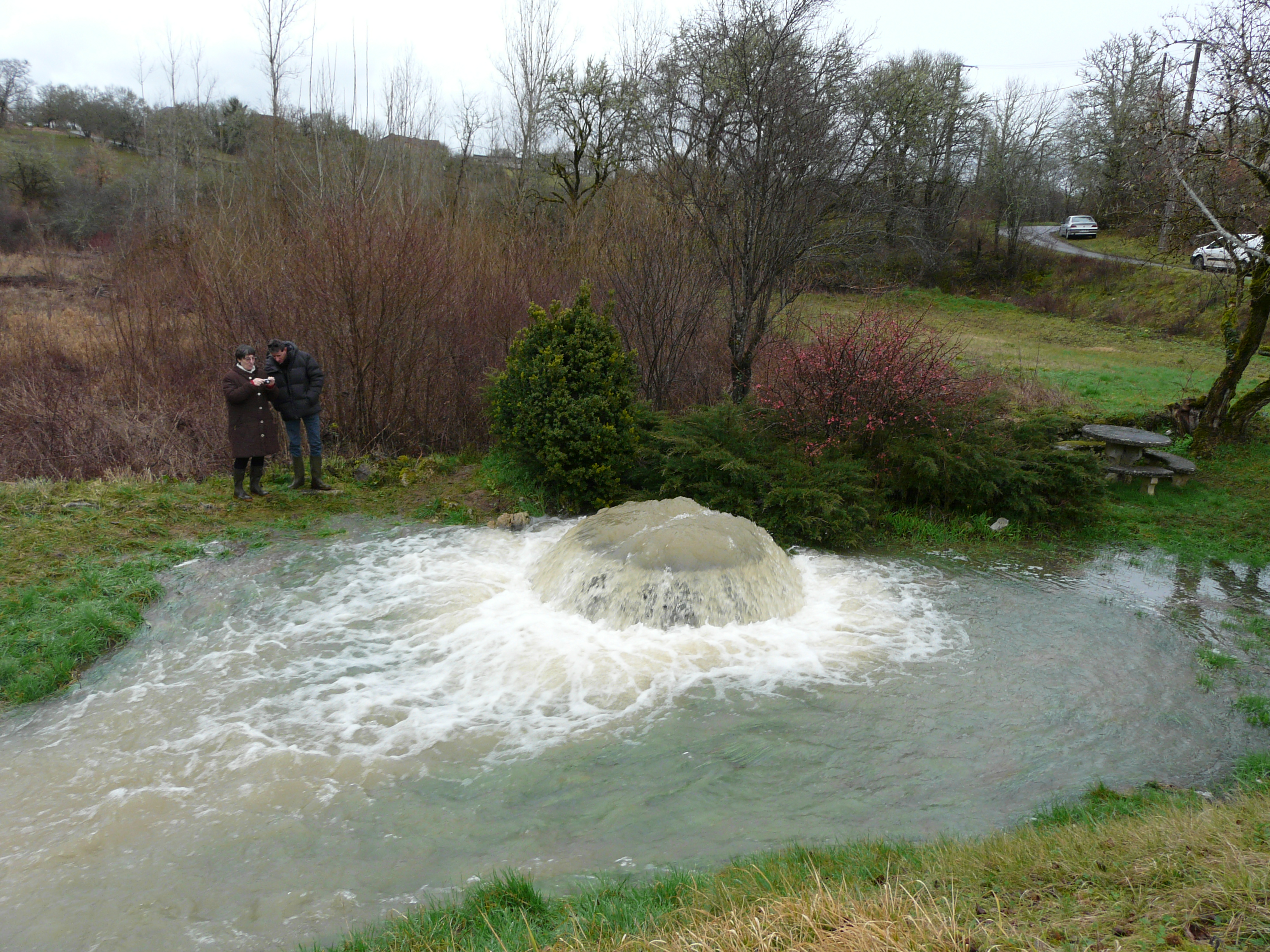 Source artésienne du Blâme (après une période de plusieurs jours de fortes pluies), puits de Bontemps, Brouchaud, Dordogne, France.